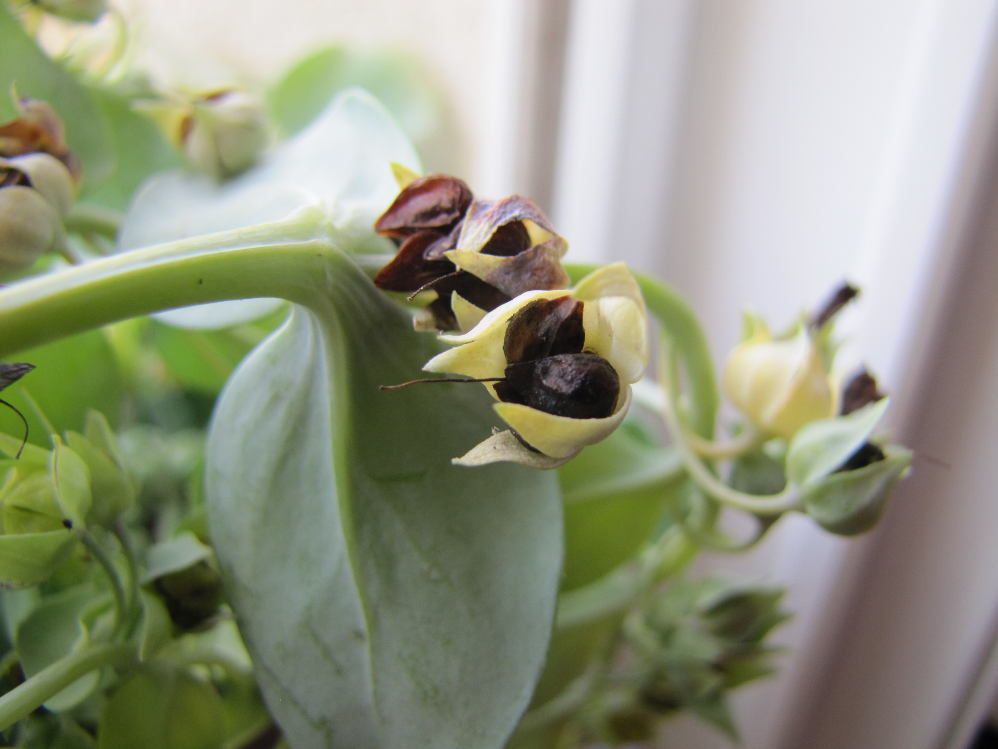 Graines de mertensias fanées